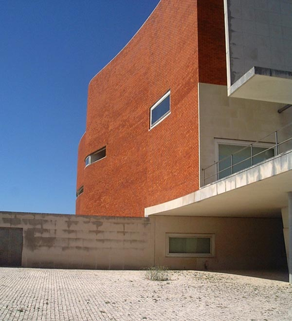 Architektur: Álvaro Siza Vieira: UniversitÃ¤tsbibliothek von Aveiro (Portugal) Fotografiert von Janekpfeifer am 12.Mai 2003